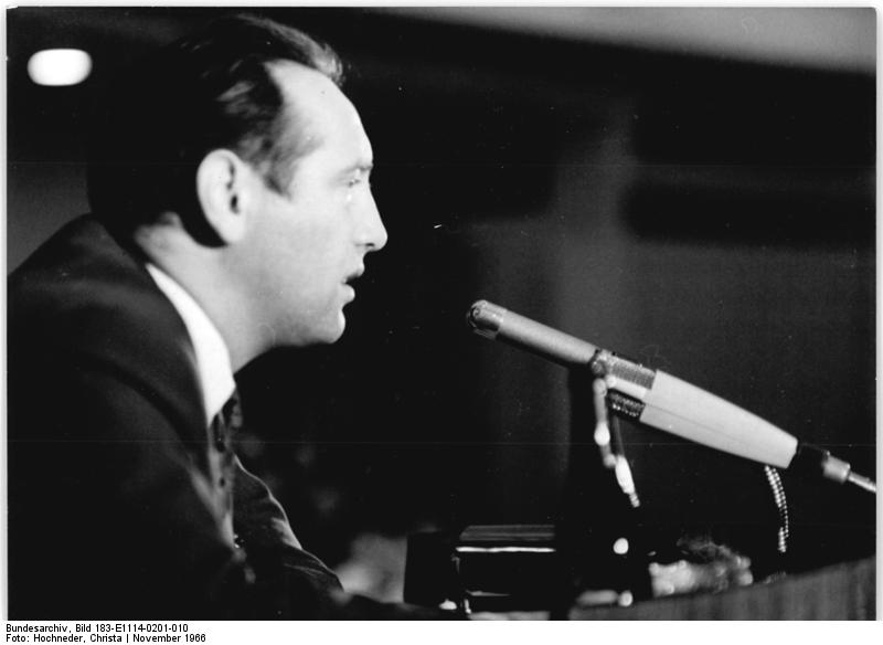 Zentralbild Hochneder 14.11.1966 Die 1. Jahreskonferenz des Deutschen Schriftstellerverbandes fand in der Zeit vom 2.11. - 4.11.66 in der Kongreßhalle am Berliner Alexanderplatz statt. 350 Teilnehmer der Konferenz (Schriftsteller, junge Autoren, schreibende Arbeiter, Literaturwissenschaftler und Bibliothekare) berieten über die Entwicklung der sozialistischen deutschen Nationalliteratur. UBz: Prof. Horst Haase während seines Diskussionsbeitrages.